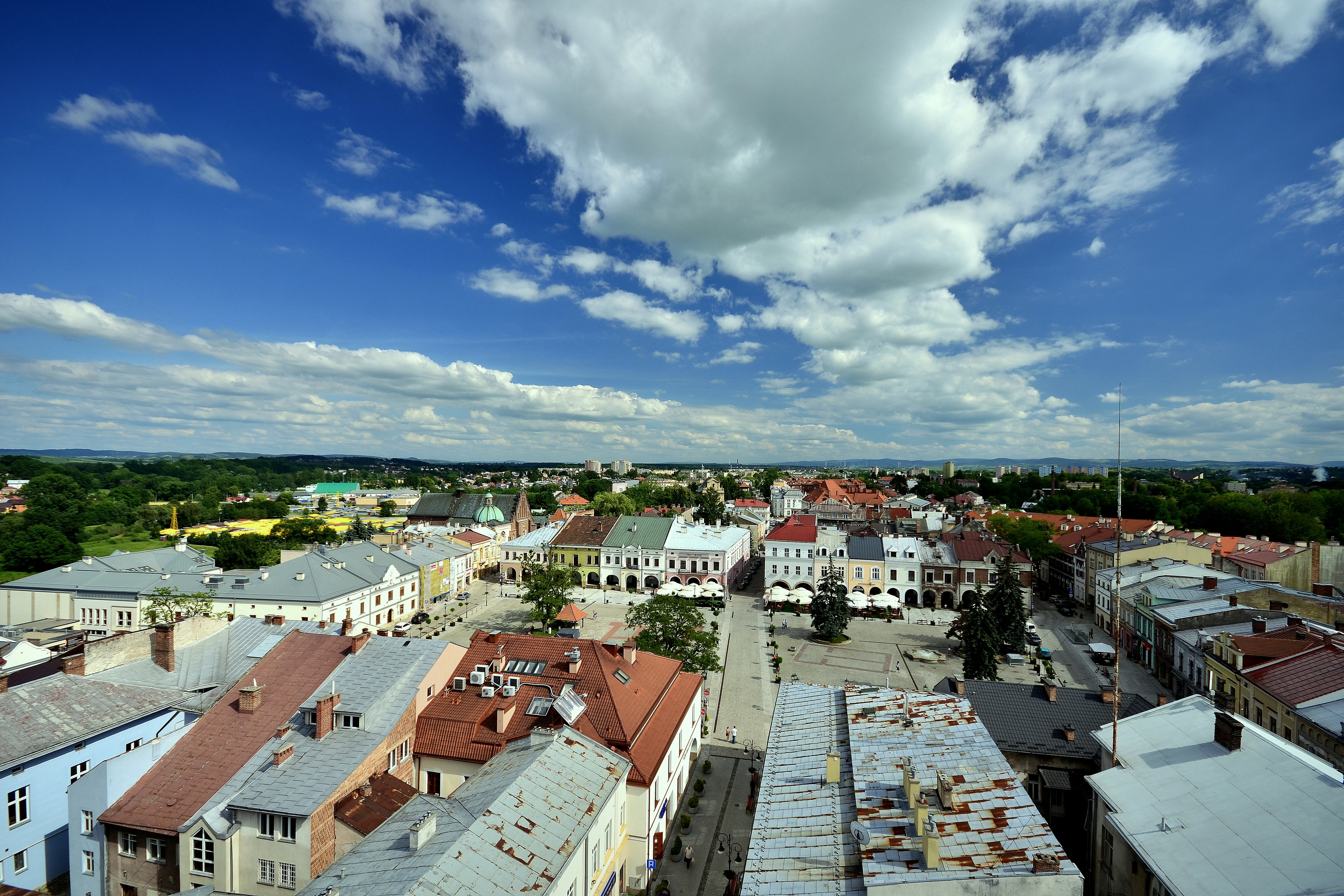 Krosno, historyczny układ urbanistyczny, XIV, XIX/XX